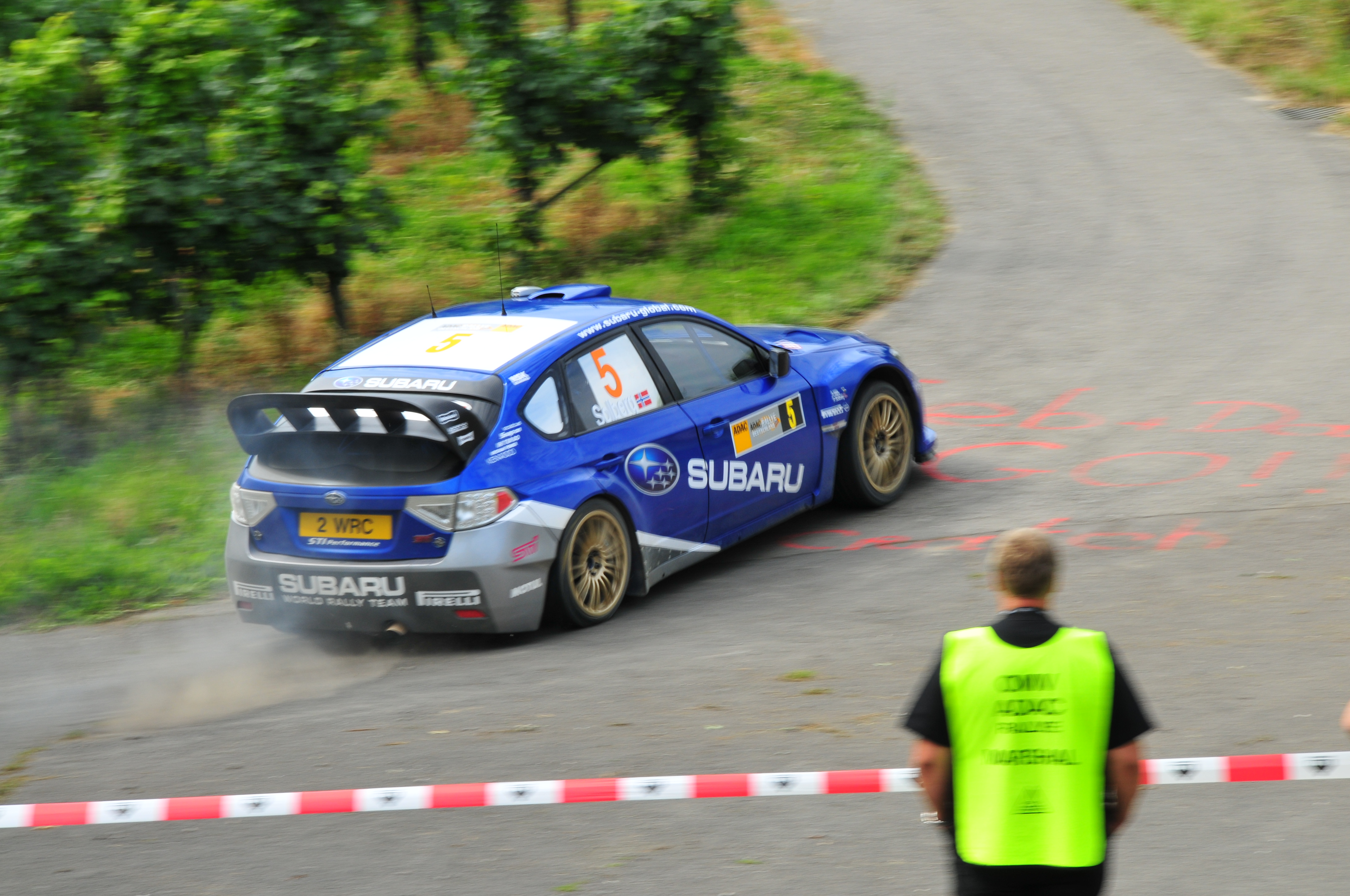 Petter Solberg driving his Subaru Impreza WRC2008 at the 2008 Rallye Deutschland.